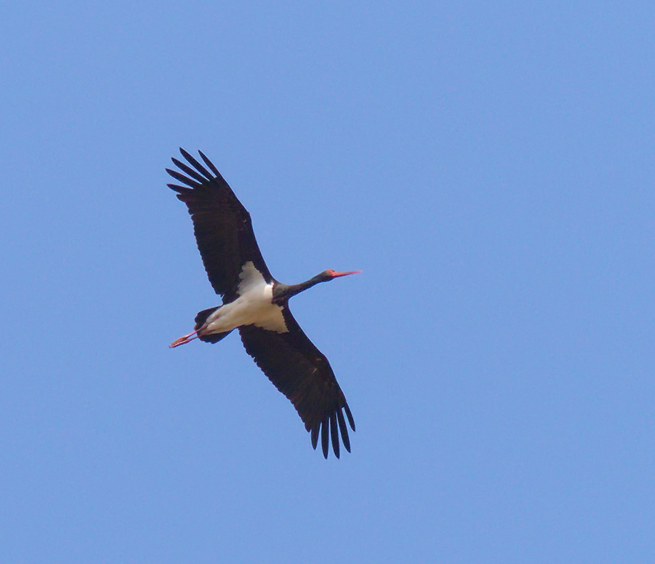 Schwarzstorch (Ciconia nigra) im Flug. Aufgenommen in Eilenburg-Hainichen, Sachsen, Deutschland.